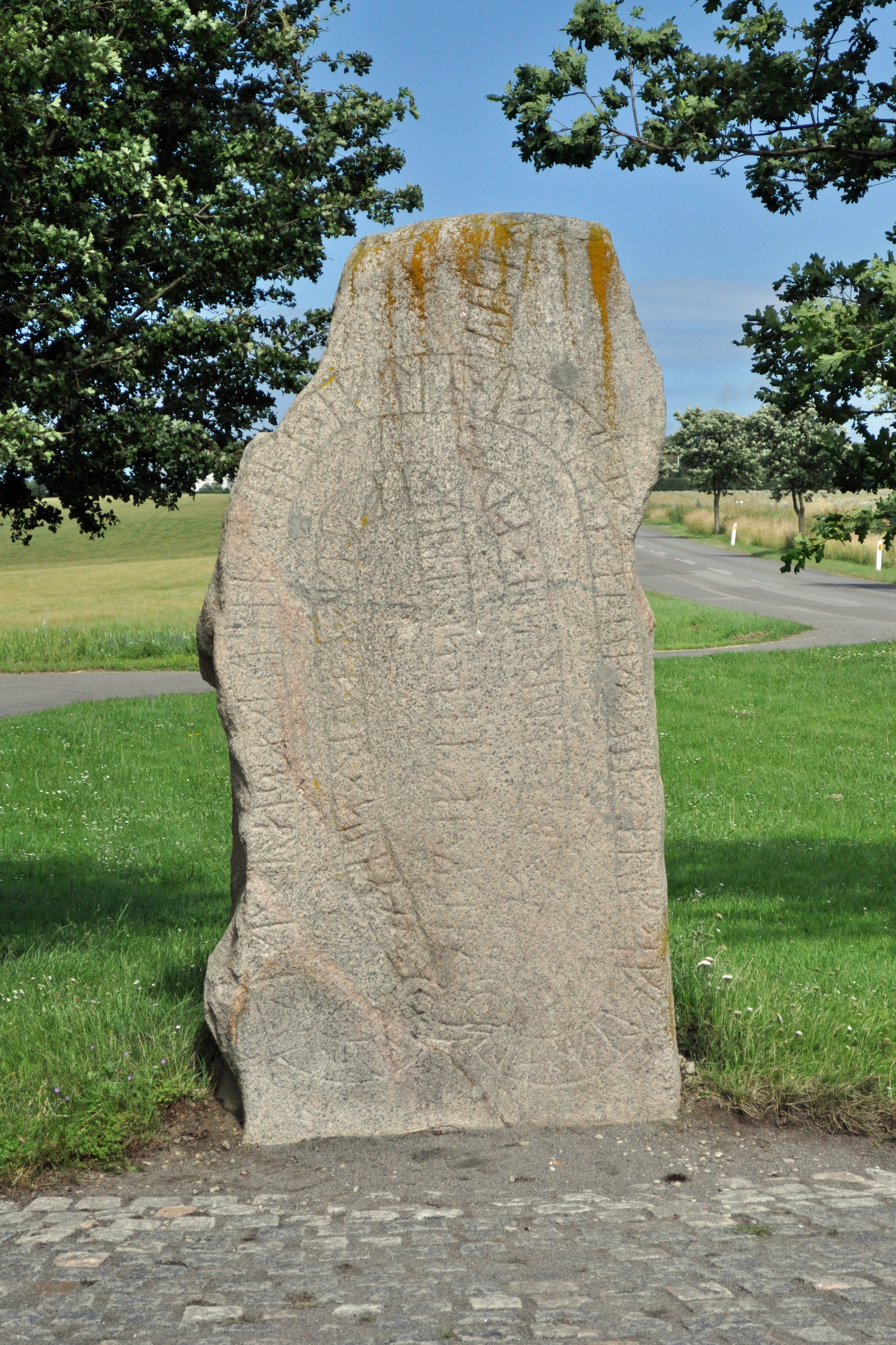 Brogårdsstenen, bei Hasle, Bornholm (2012-07-10), by Klugschnacker in Wikipedia